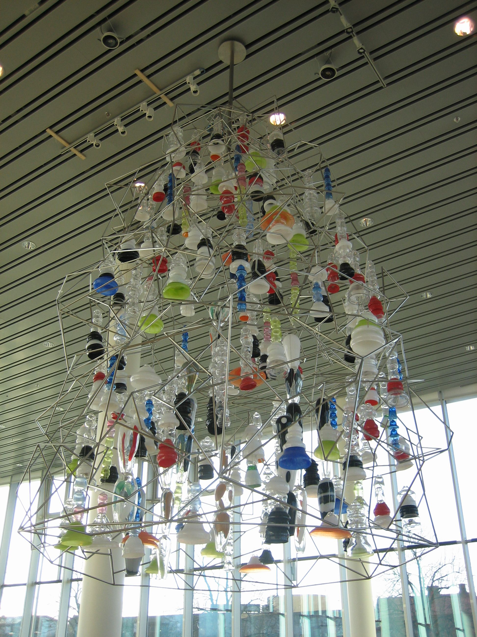 Another Thinking Bell i Halmstads Stadsbibliotek av Olav Cristopher Jenssen